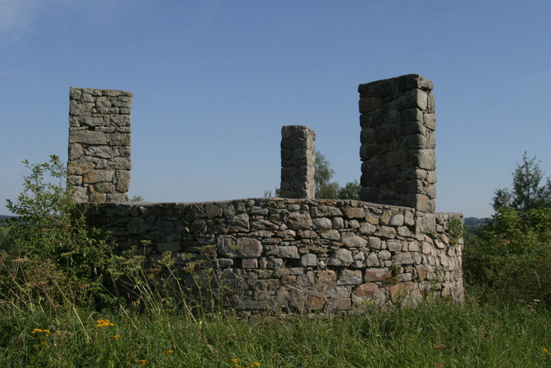 Popraviste